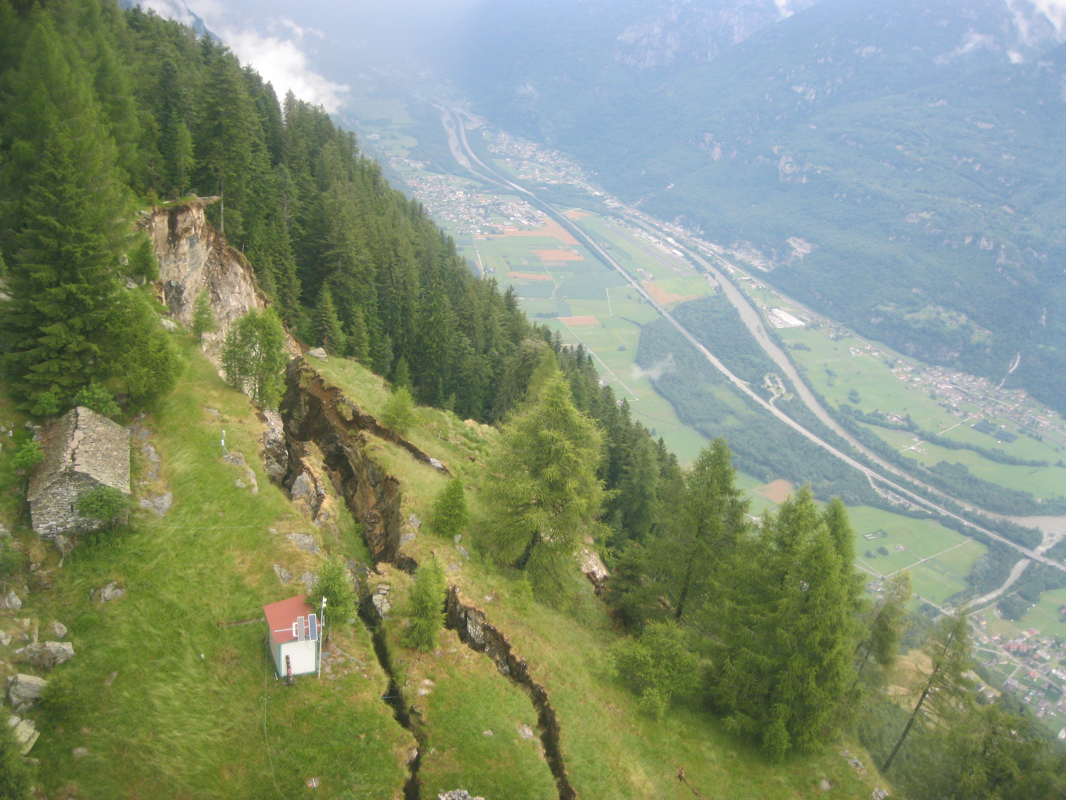 La fessura della frana del Valegión sull'Alpe di Ròscioro, il 6 luglio 2012